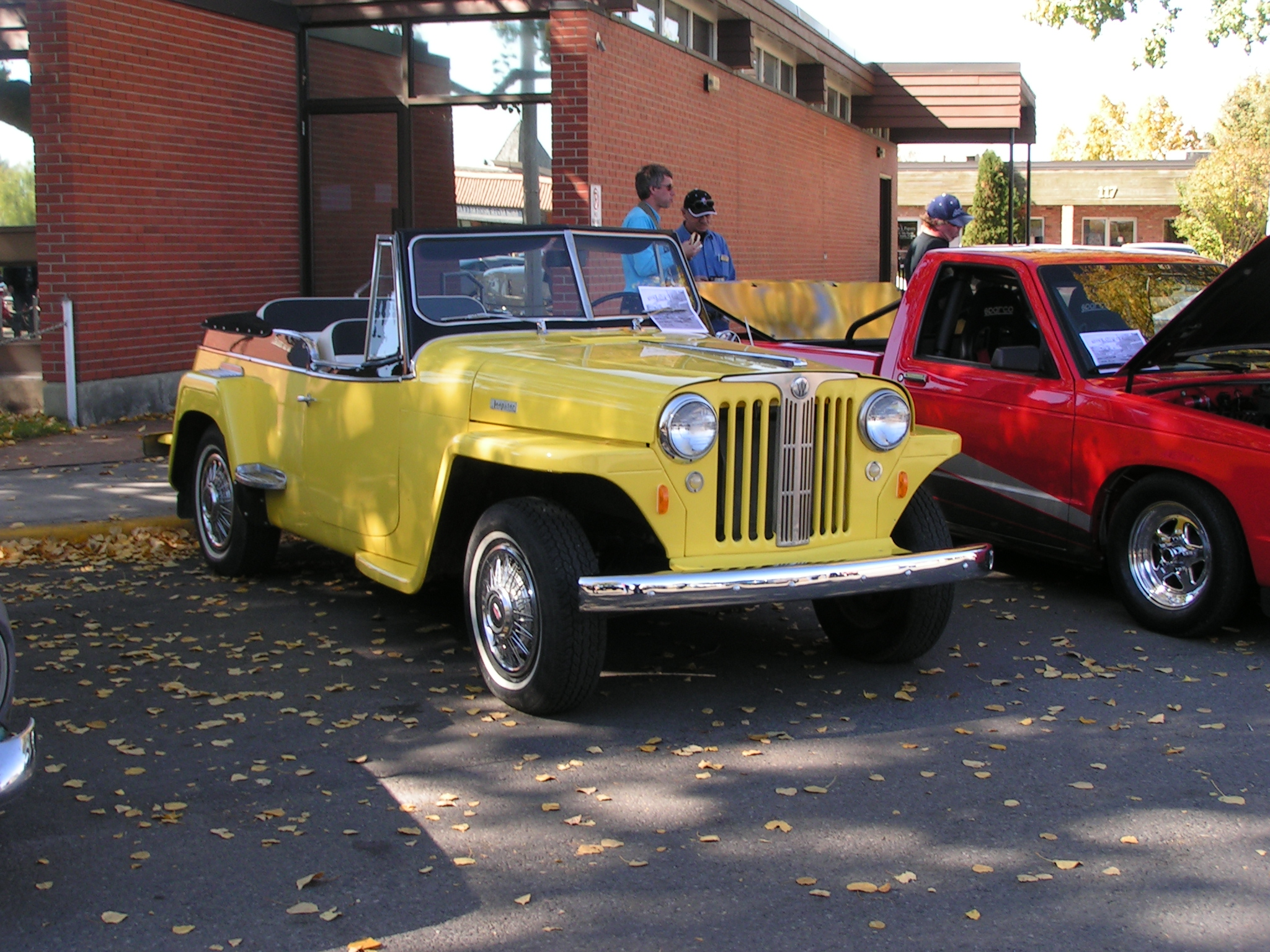 Jeepster